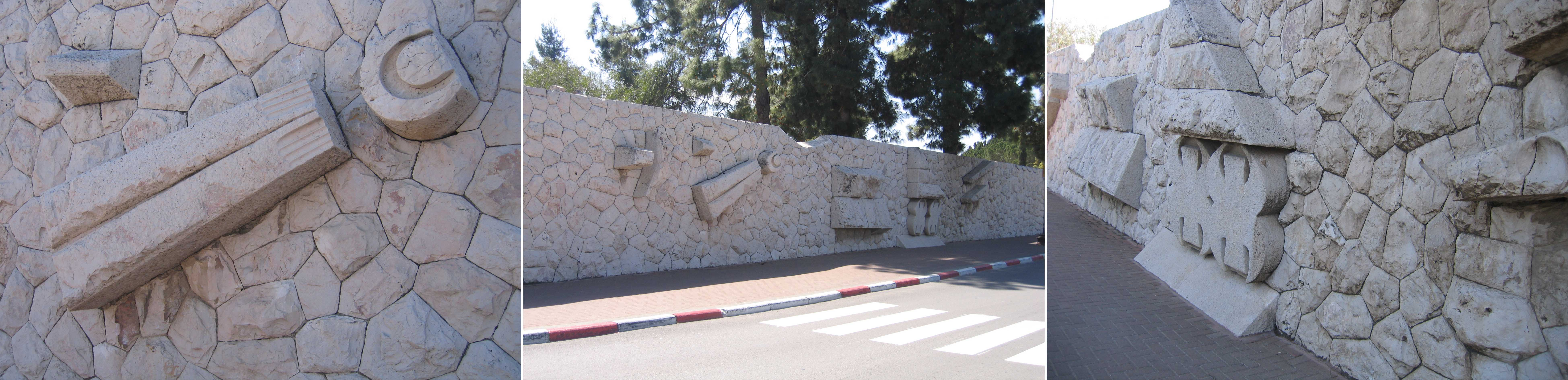 Sculpture